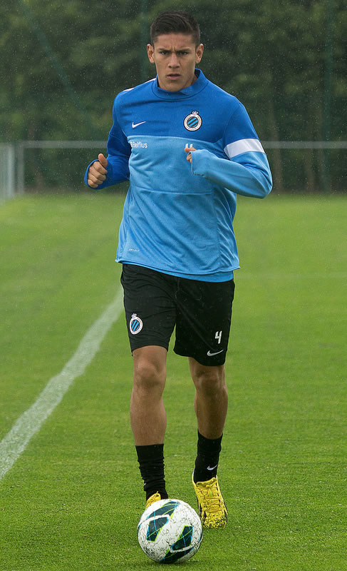 Óscar Duarte, speler van Club Brugge